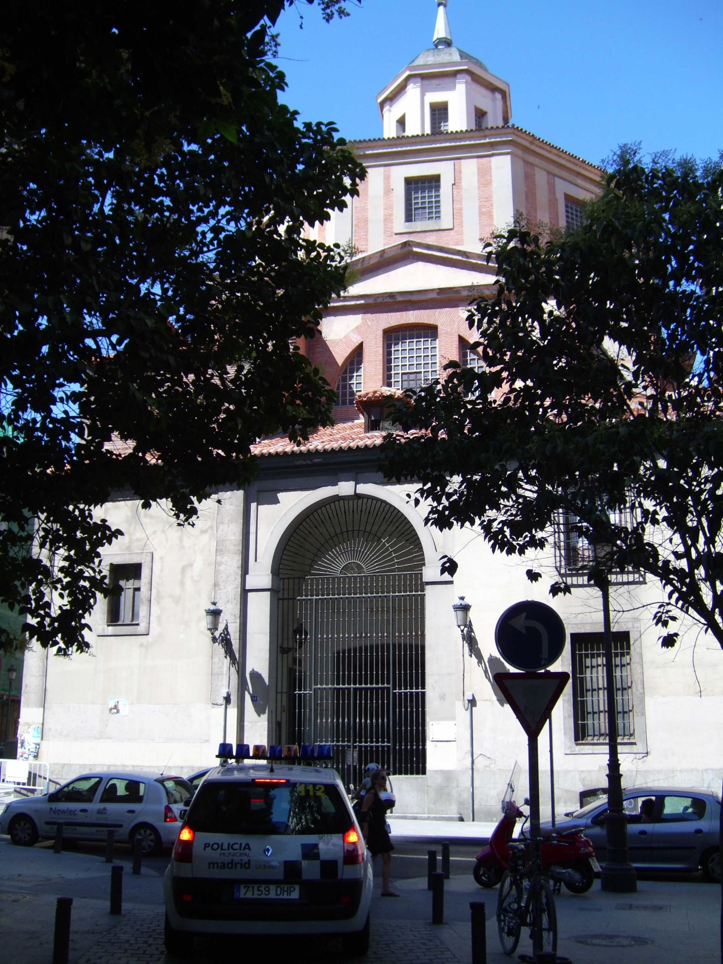 Iglesia de San Sebastián (Madrid), fachada principal